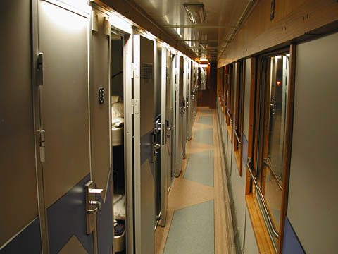 En typisk korridor i en Sovvagn